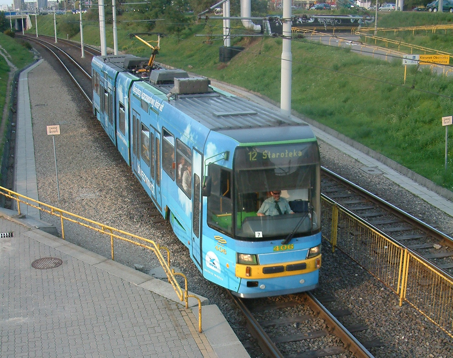 Tatra RT6N1 approching to Aleje Solidarności station on PST line in Poznań